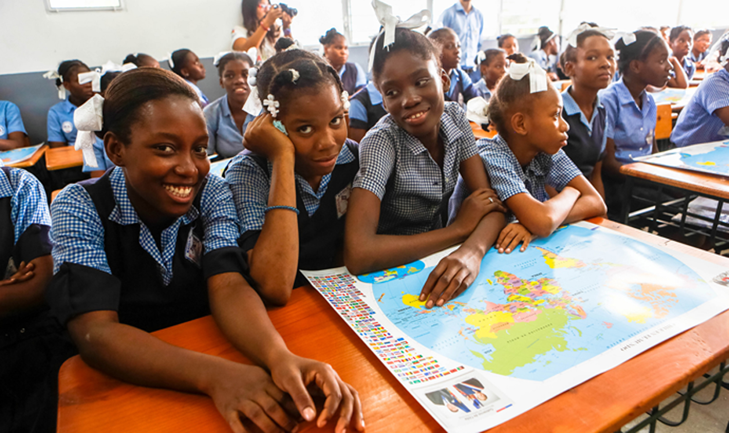 Ministro de Defensa comparte con alumnas de la Escuela República de Chile. En el marco de la primera visita oficial del ministro de Defensa, José Antonio Gómez, a la República de Haití, la autoridad compartió con las niñas que estudian en la escuela “República de Chile”; establecimiento educacional que imparte clases a más de 300 niñas de Puerto Príncipe y que fue reconstruida luego del terremoto de enero del 2010. “Este colegio ha sido construido con aportes de instituciones chilenas, con participación de jóvenes. Es impresionante lo bien constituido que se encuentra, hay un esfuerzo grande por dar a los niñas una buena educación”, dijo el ministro Gómez. Este importante proyecto fue liderado por el Gobierno de Chile, a través de su embajada en Haití, contó con la activa participación y compromiso de América Solidaria y el aporte de la empresa privada. La nueva infraestructura, una de las más modernas en su tipo en la isla, cuenta con 10 aulas de clases, baños, oficinas, sala de profesores, lugares de servicio como cocina, enfermería, biblioteca y laboratorio de computación.